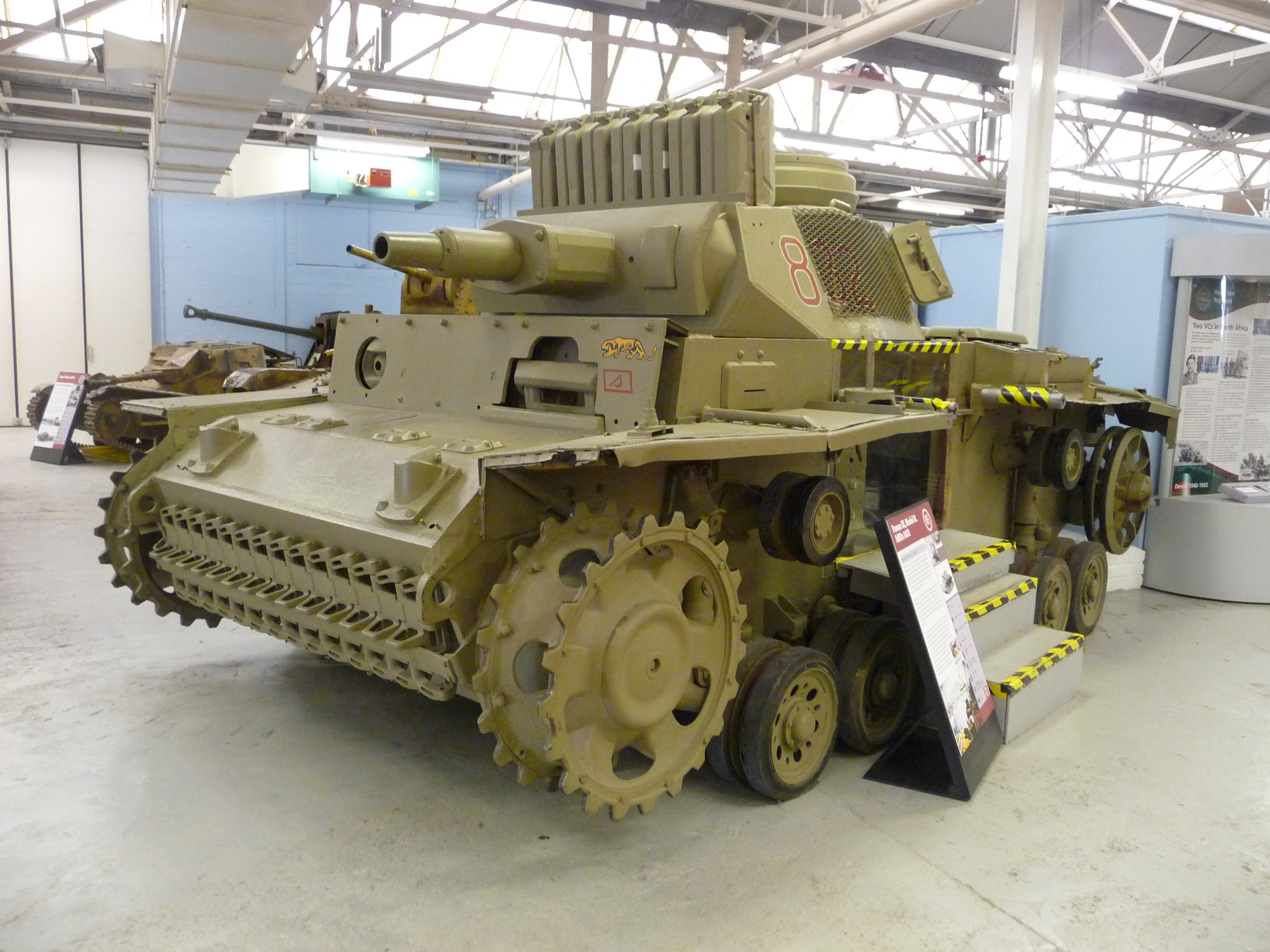 Sd Kfz 141/2 Panzerkampfwagen III Ausf N